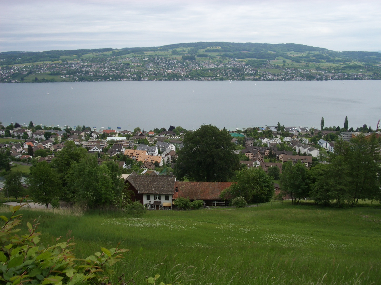 Oberrieden ZH, Switzerland self-made, May 2006